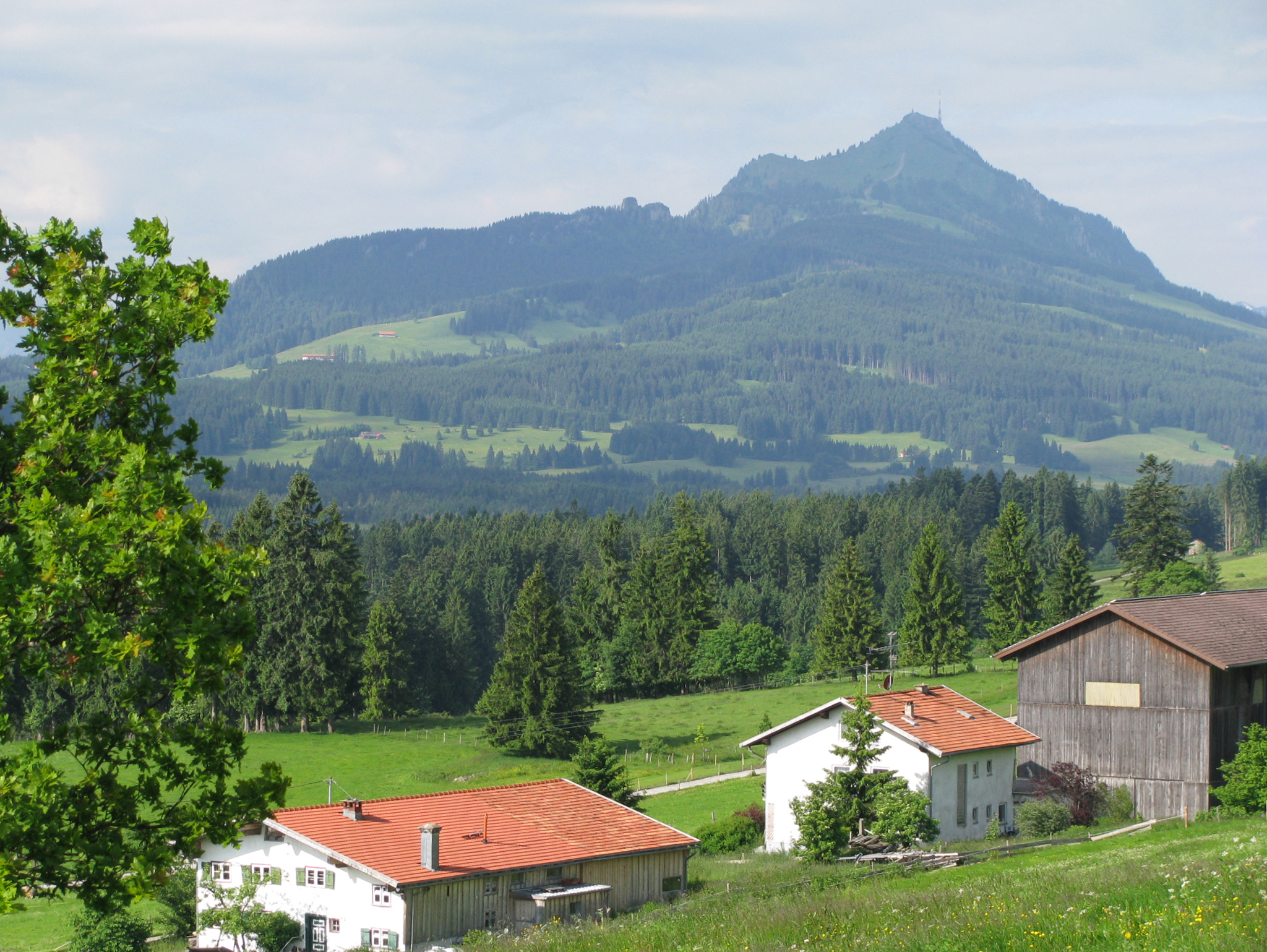 Grünten im Oberallgäu, Ansicht von Oberellegg, Gemeinde Wertach